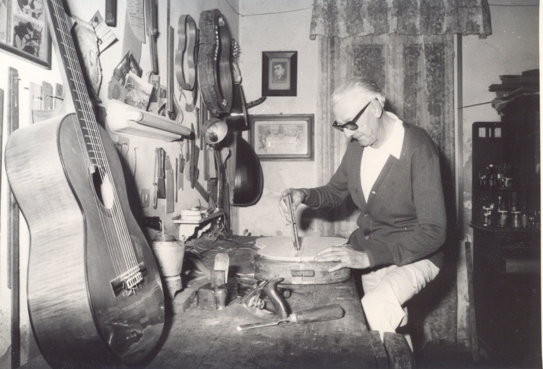 Leone Sanavia al lavoro nel suo laboratorio